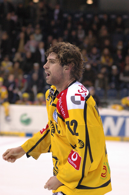 Chris Herperger im Trikot der Krefeld Pinguine 2006